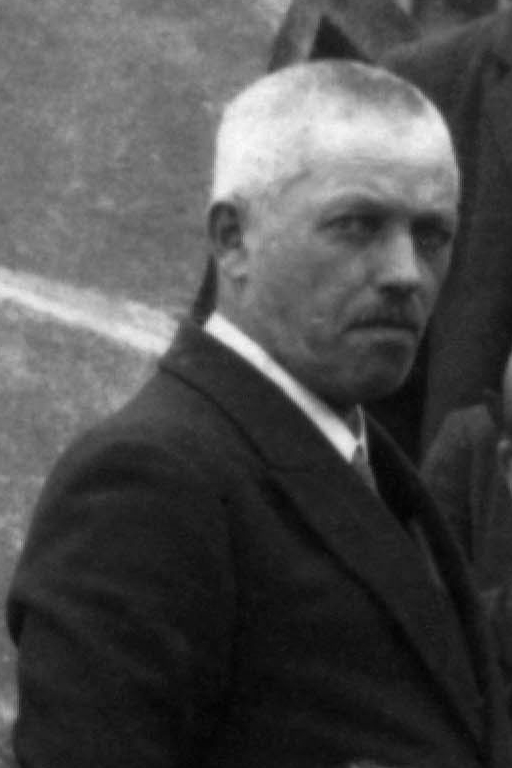 aus einer Fotosammlung, die bei der Erforschung des Lebens und Werks von August Högn (1878 - 1961) entstand.